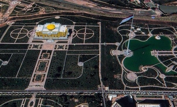 Вид из вертолета